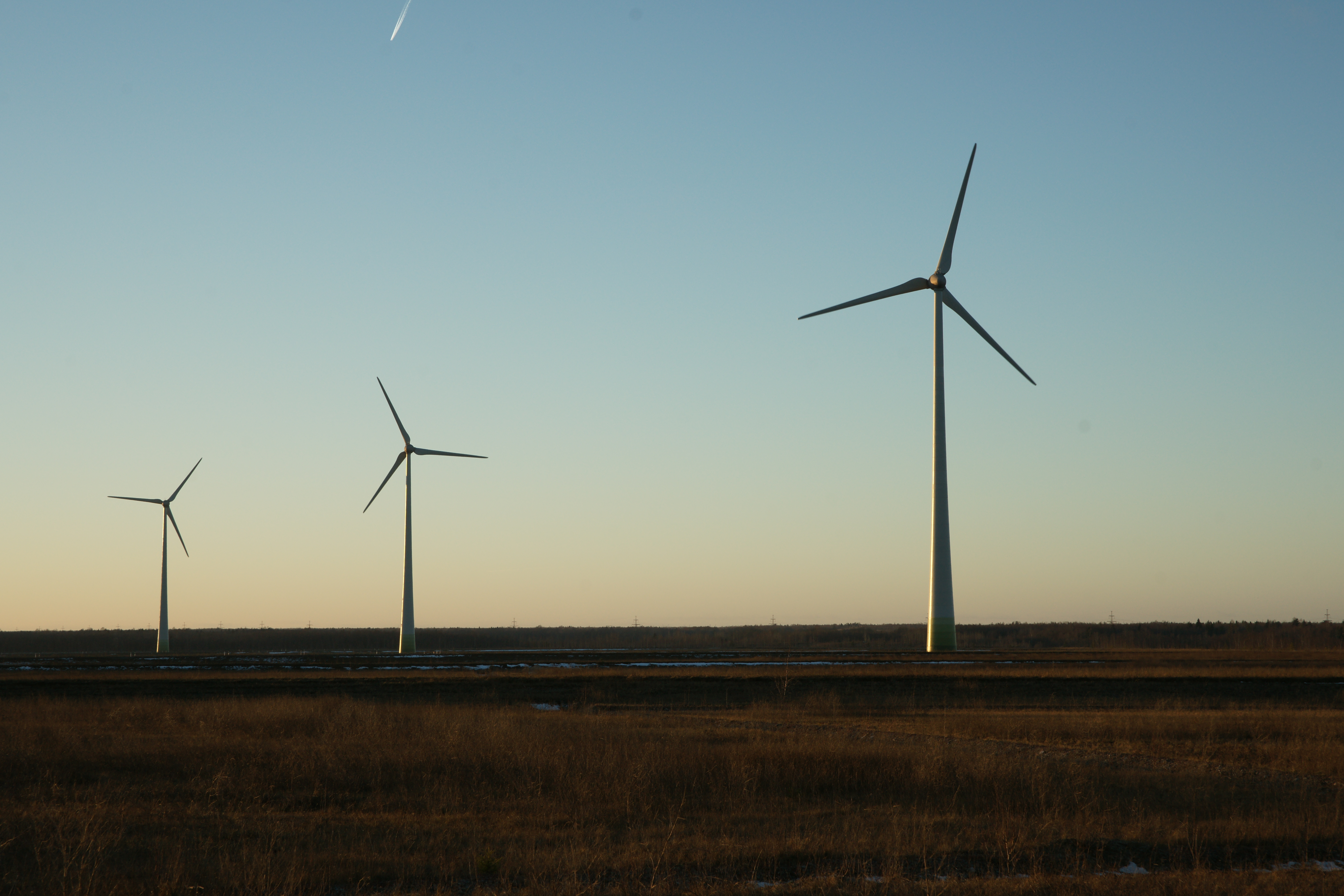 Narva tuhavälja tuulepark